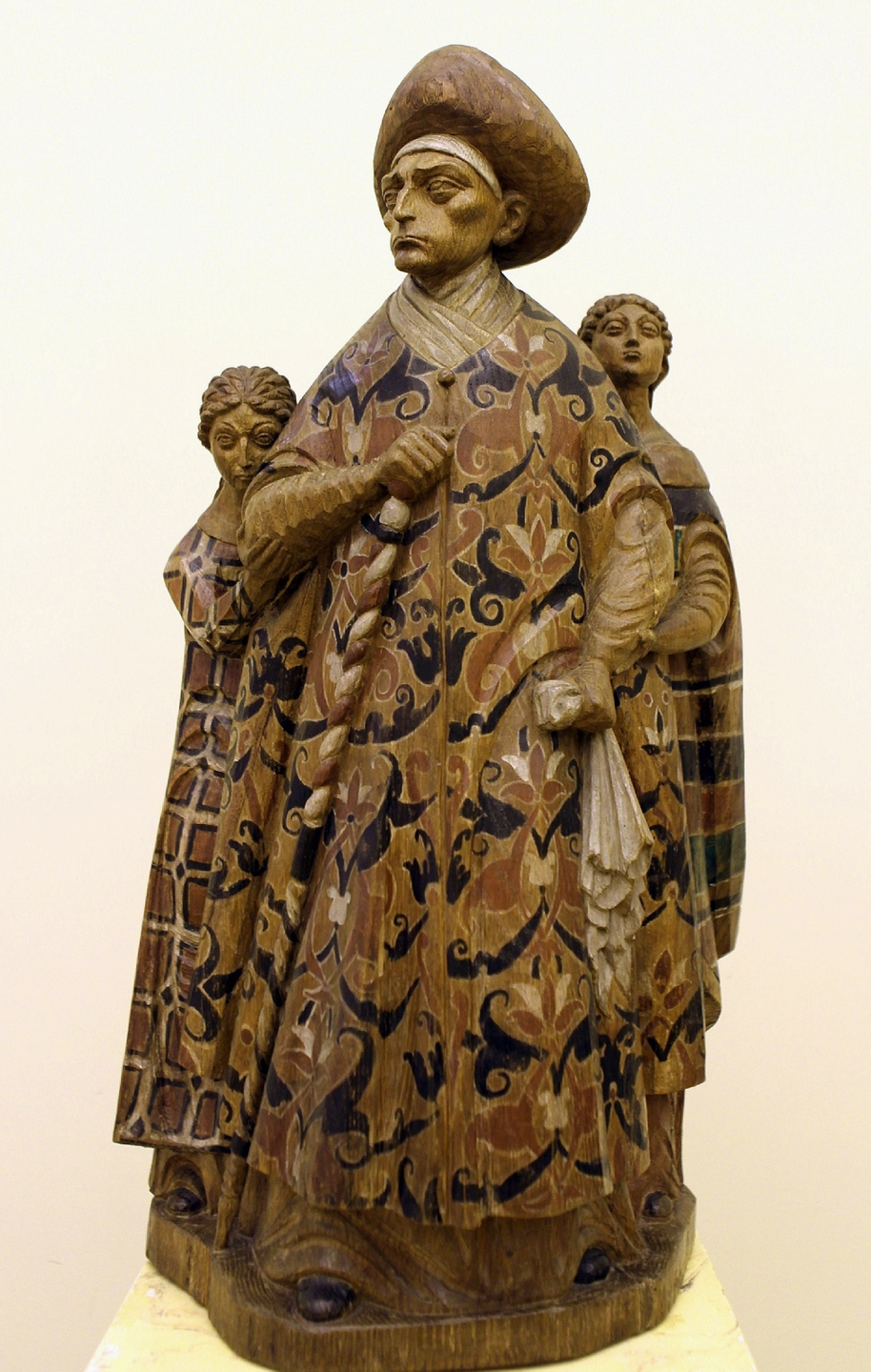 Д.С. Стеллецкий. «Знатная боярыня». 1910. ГРМ